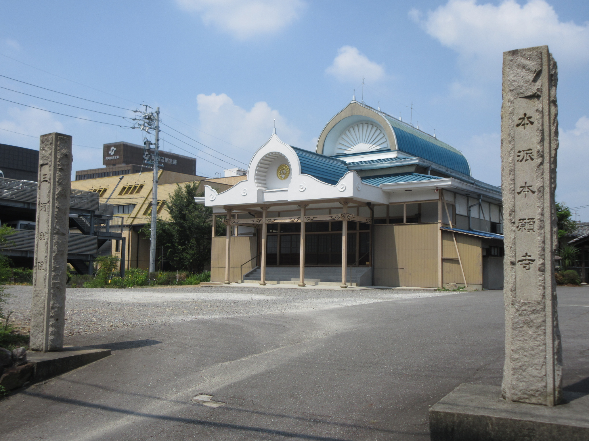 西本願寺三河別院（岡崎市十王町）